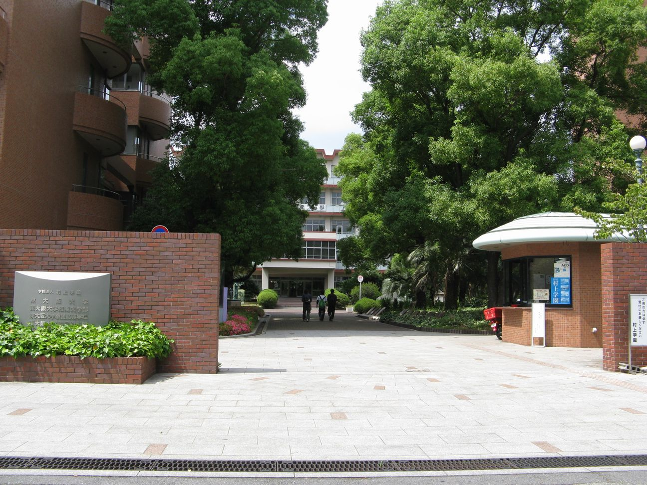 東大阪大学 正門 2009年5月25日 Bakkai撮影